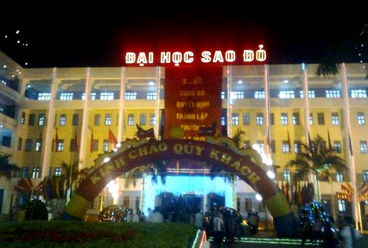 Trường Đại học Sao Đỏ. 24 Thái Học 2, phường Sao Đỏ, thị xã Chí Linh, tỉnh Hải Dương.